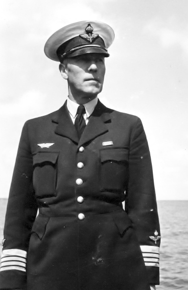 Överste Gösta Hård, flottiljchef vid F 6 Karlsborg åren 1941-1950.